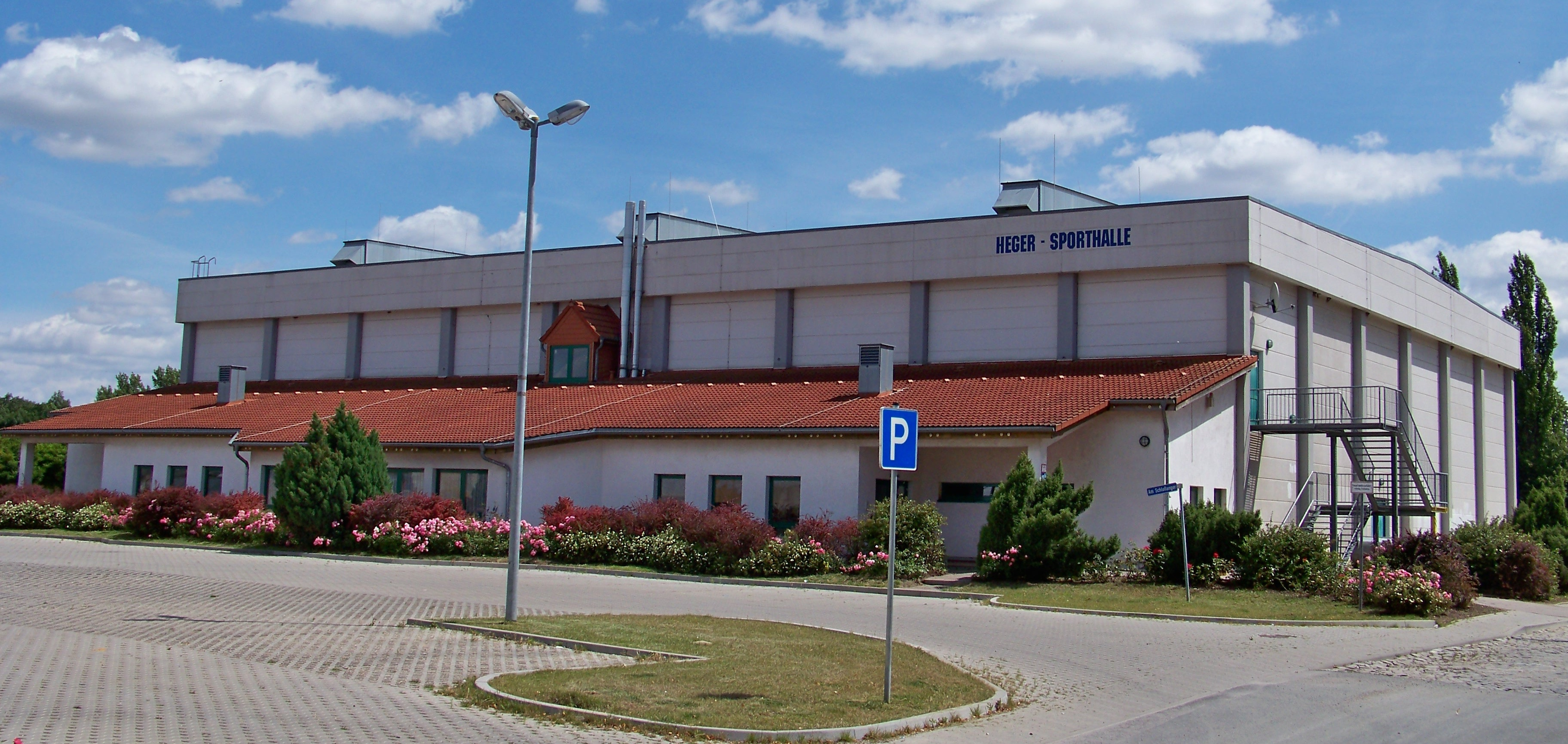 Heger-Sporthalle in Calbe (Saale)